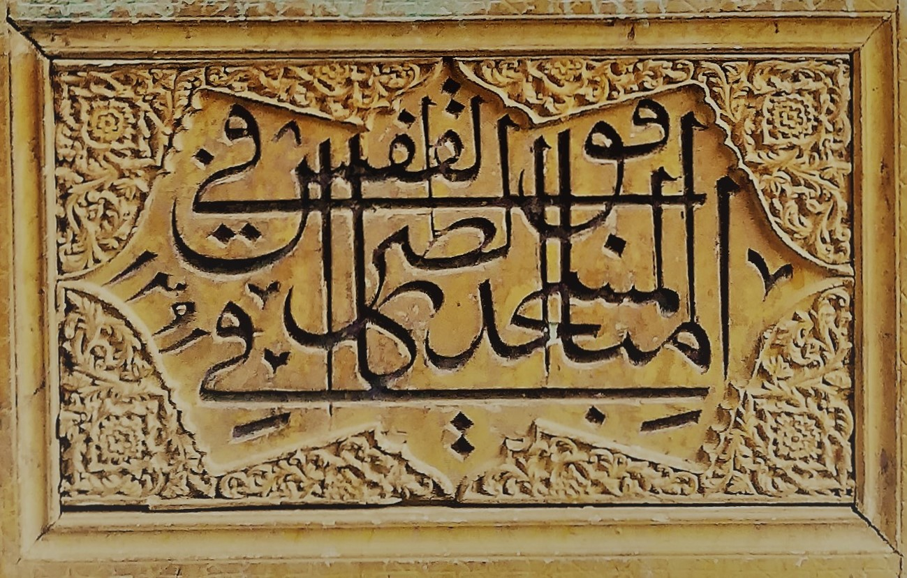 درب شمالی مسجد امام خمینی یا سلطانی بروجرد که تاریخ ساخت آن 1291 قمری است